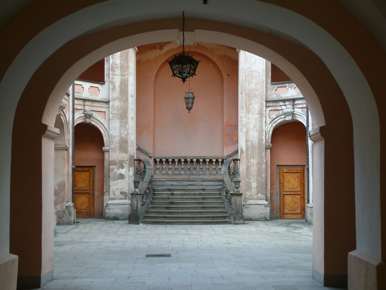 Dziedziniec szkoly pojezuickiej Poznan